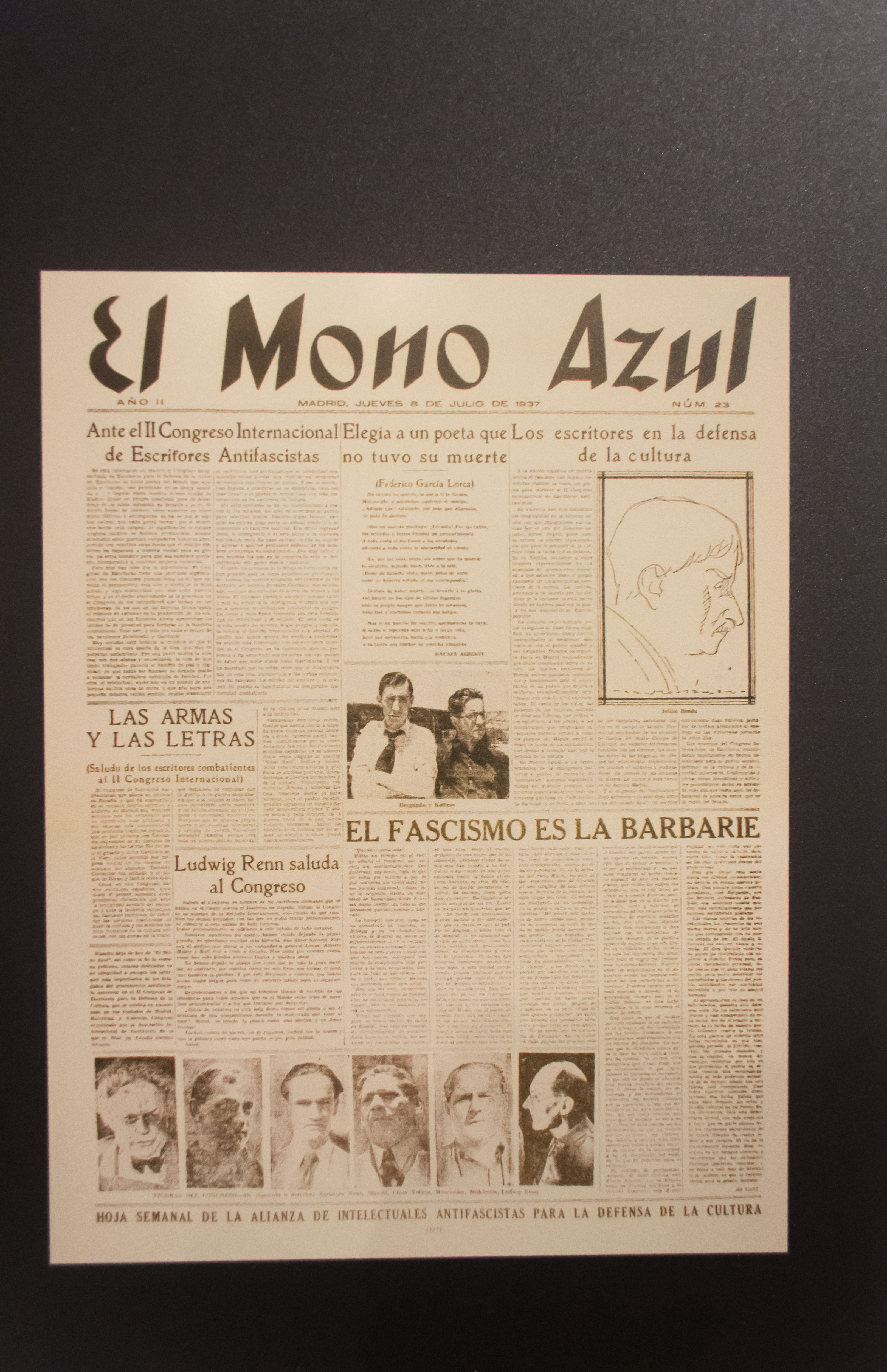 El Mono Azul (8-7-1937). Publicación de la Alianza de Intelectuales Antifascistas para la defensa de la cultura. Exposición Por la defensa de la Cultura en el Centro del Carmen de Valencia.